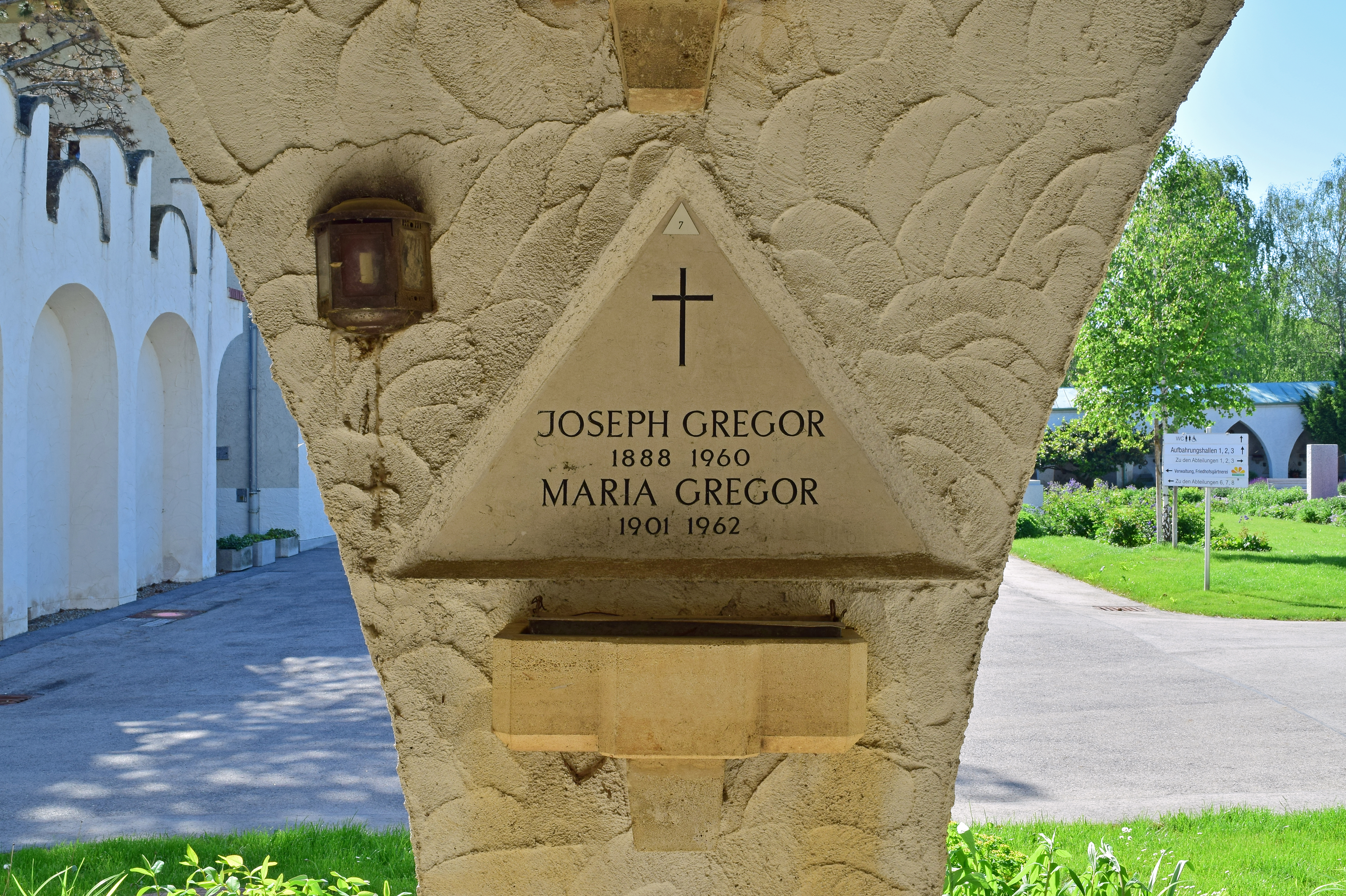 Ehrenhalber gewidmetes Grab von Joseph Gregor im Arkadenhof der Feuerhalle Simmering (Abteilung ARI, Nr. 7)